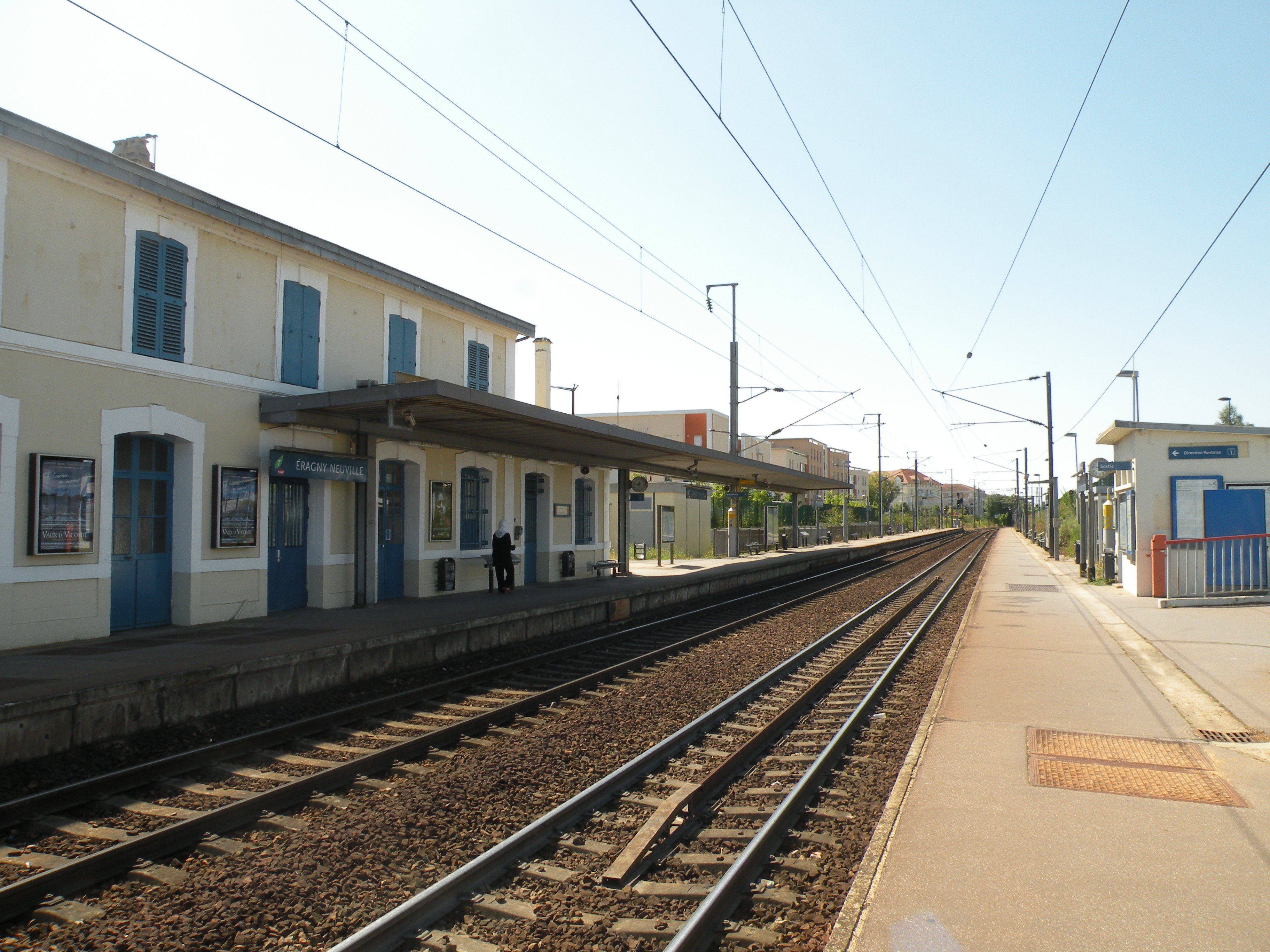 quai de la gare d'Éragny-sur-Oise